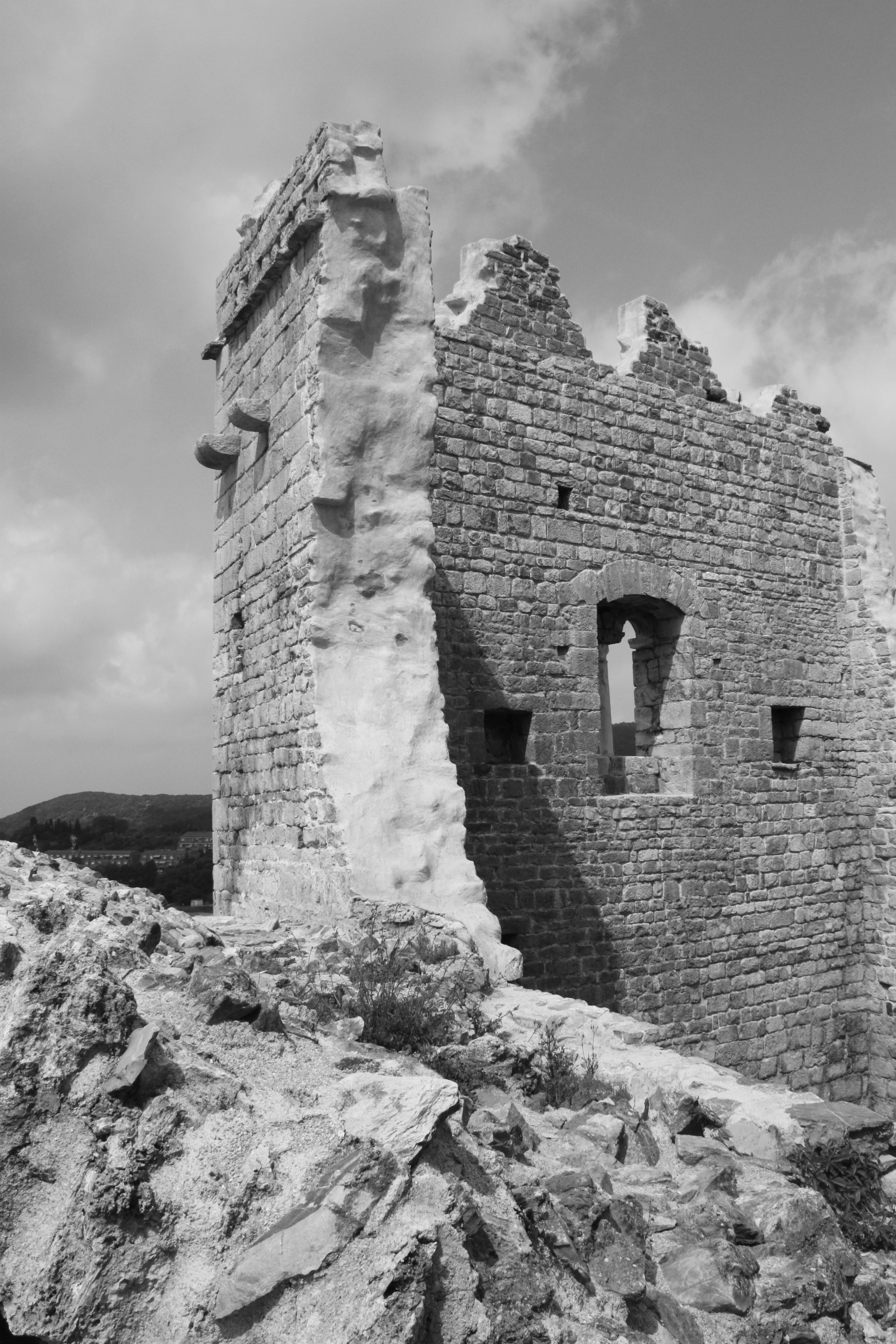 Particolare della Rocca di campiglia marittima